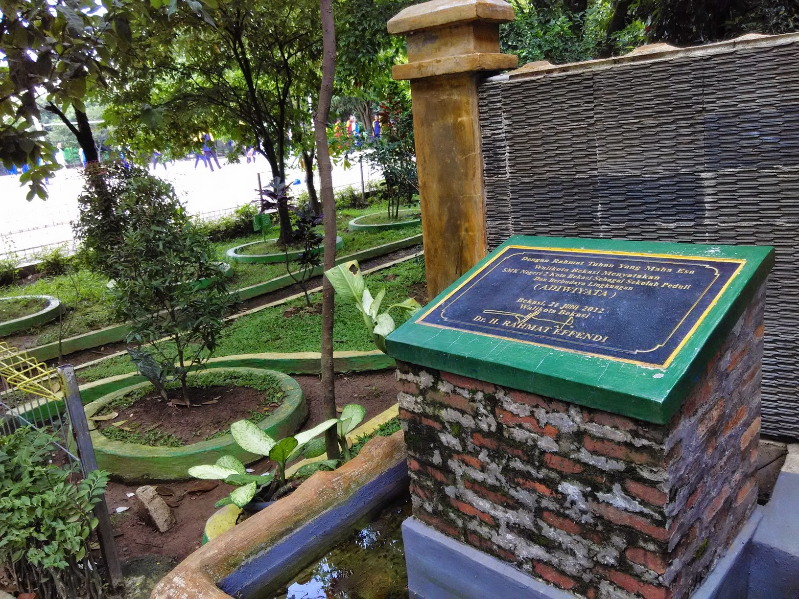 Piagam Adiwiyata Mandiri 2012